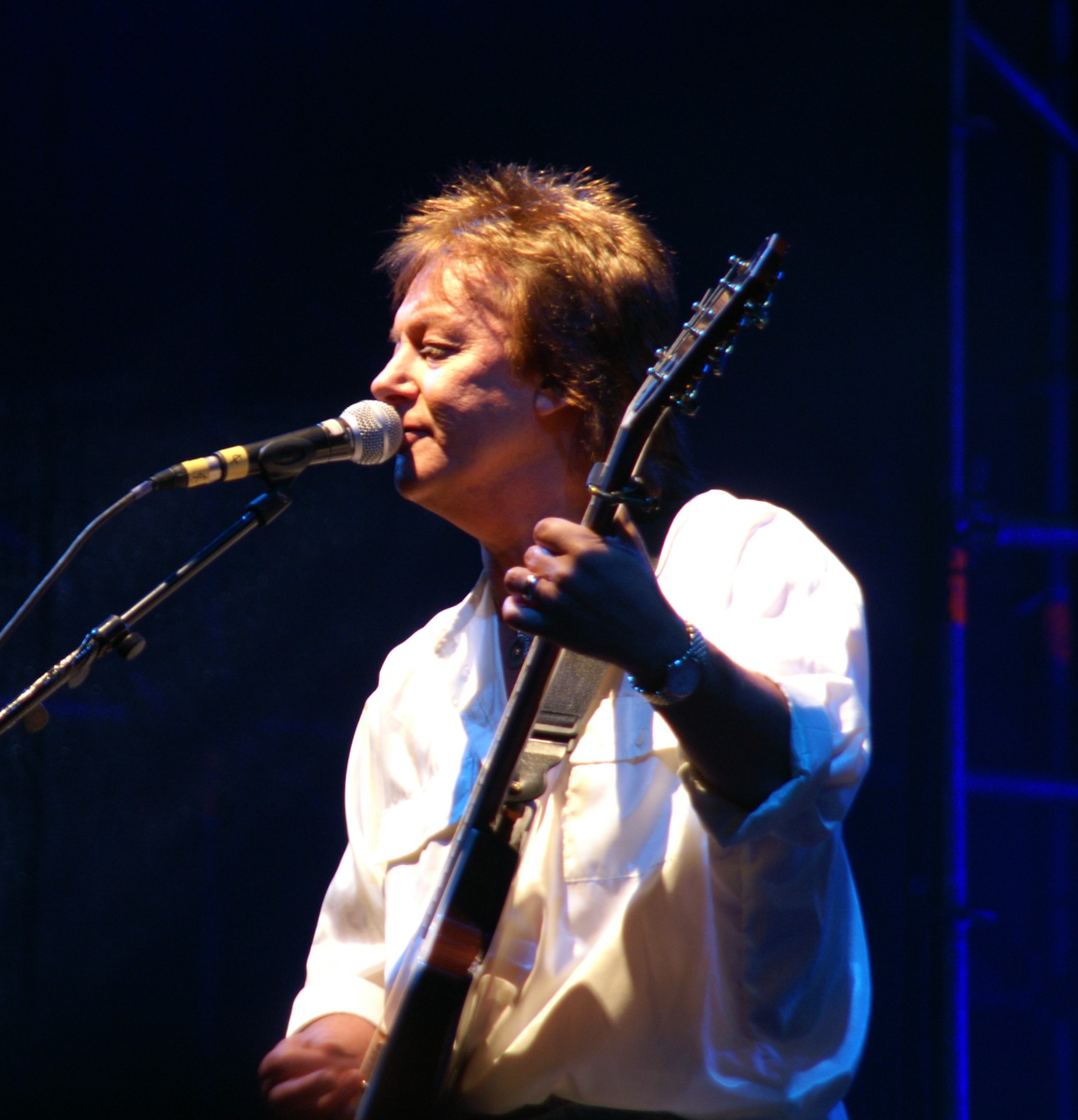 Chris Norman bei einem Konzert in Erfurt